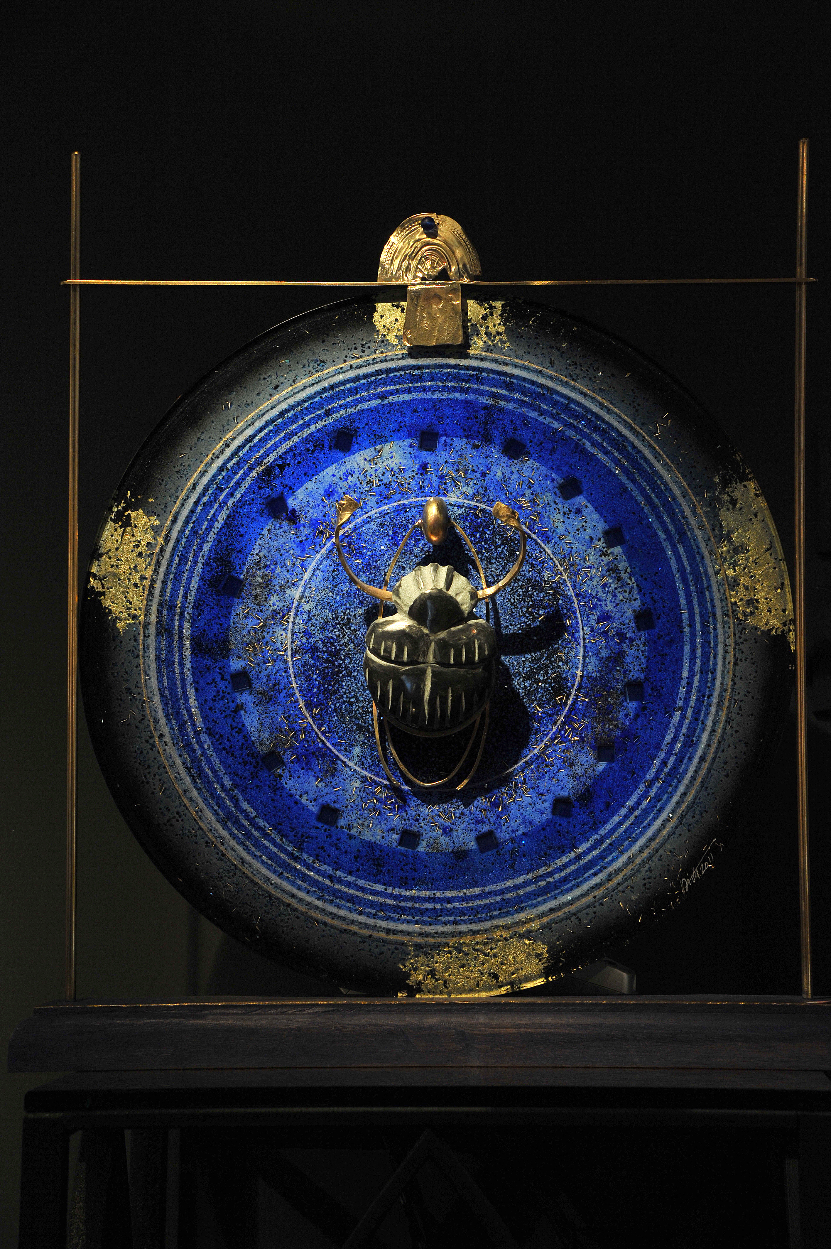 Photo de Jean Divry Œuvre de Jean Divry